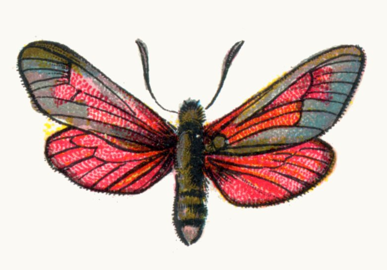 Zygaena purpuralis